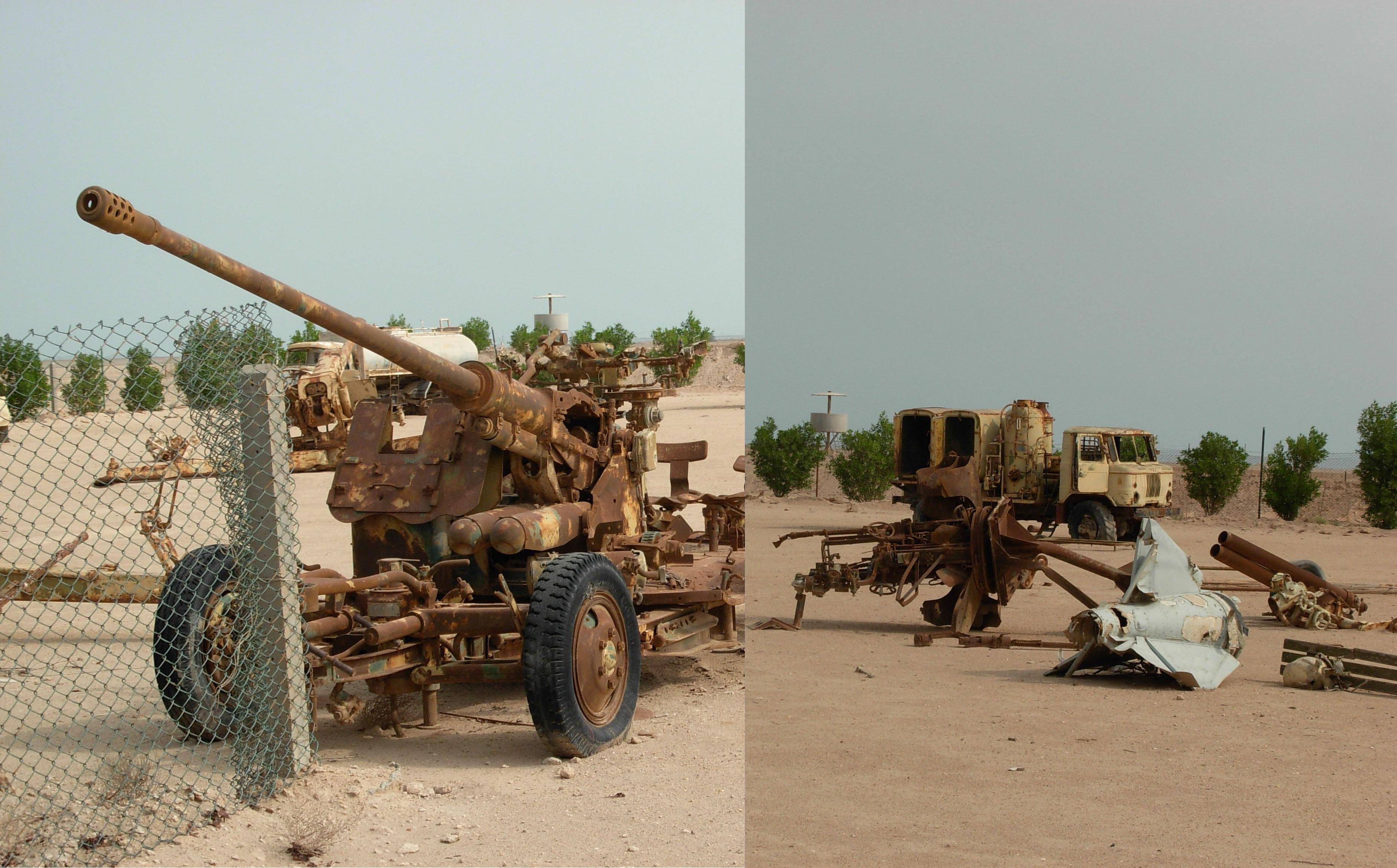 ഒന്നാം ഗൾഫ് യുദ്ധത്തിനുശേഷം ഉപേക്ഷിക്കപ്പെട്ട യുദ്ധോപകരണങ്ങൾ. മിസൈലിന്റെ ഭാഗവും കാണാം. കുവൈറ്റിലെ ഫയിലക്ക ദ്വീപിൽ നിന്നുള്ള ദൃശ്യം.